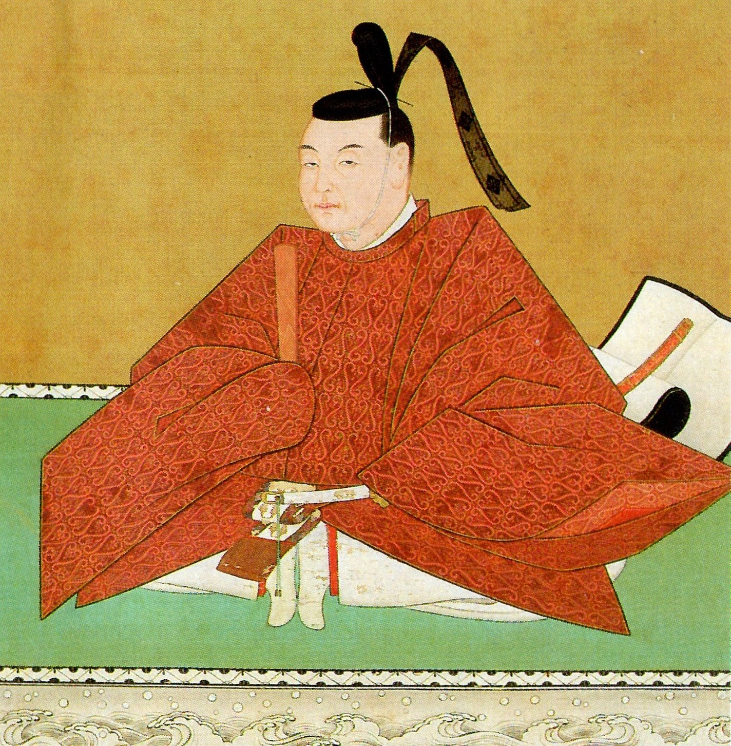 鍋島直條の肖像。